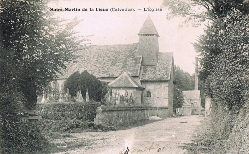 Église de Saint-Martin-de-la-Lieue, département du Calvados, France, sur une carte postale de la fin du 19e ou du début du 20e siècle. Vue du Sud.